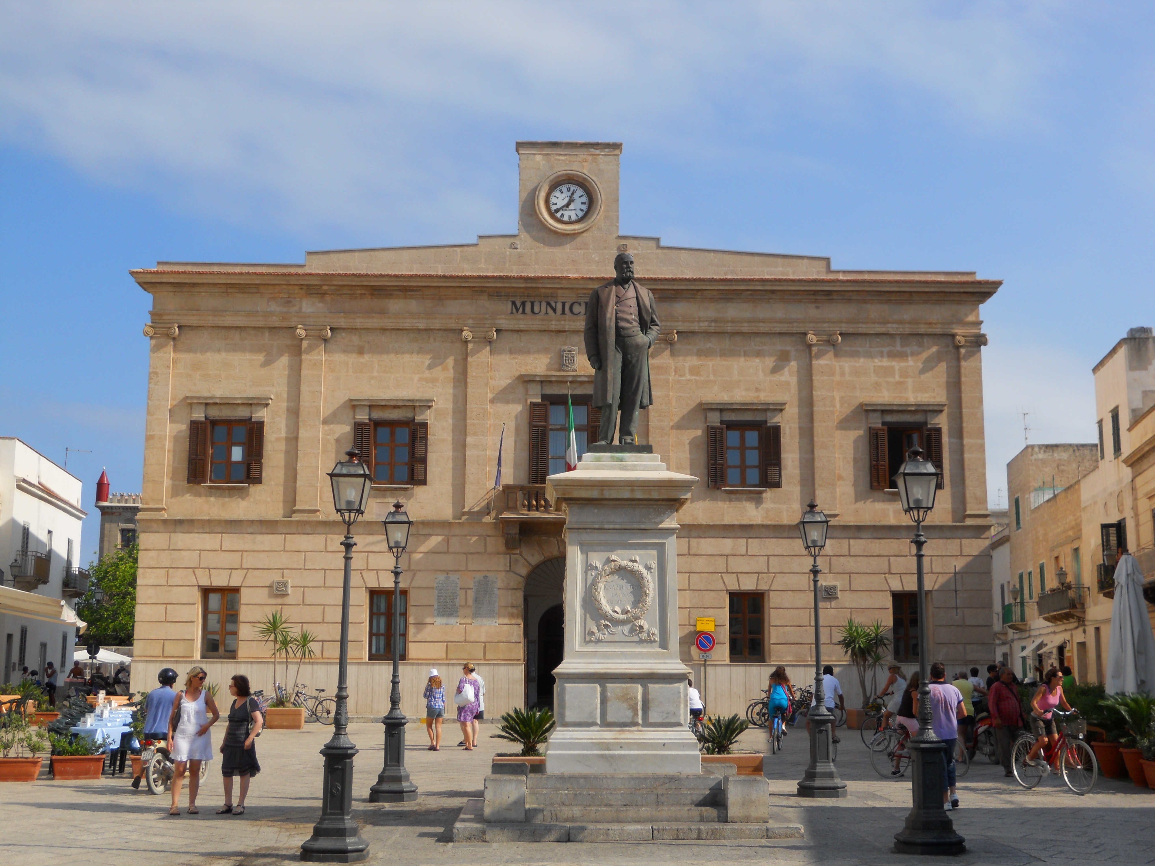 Il Municipio